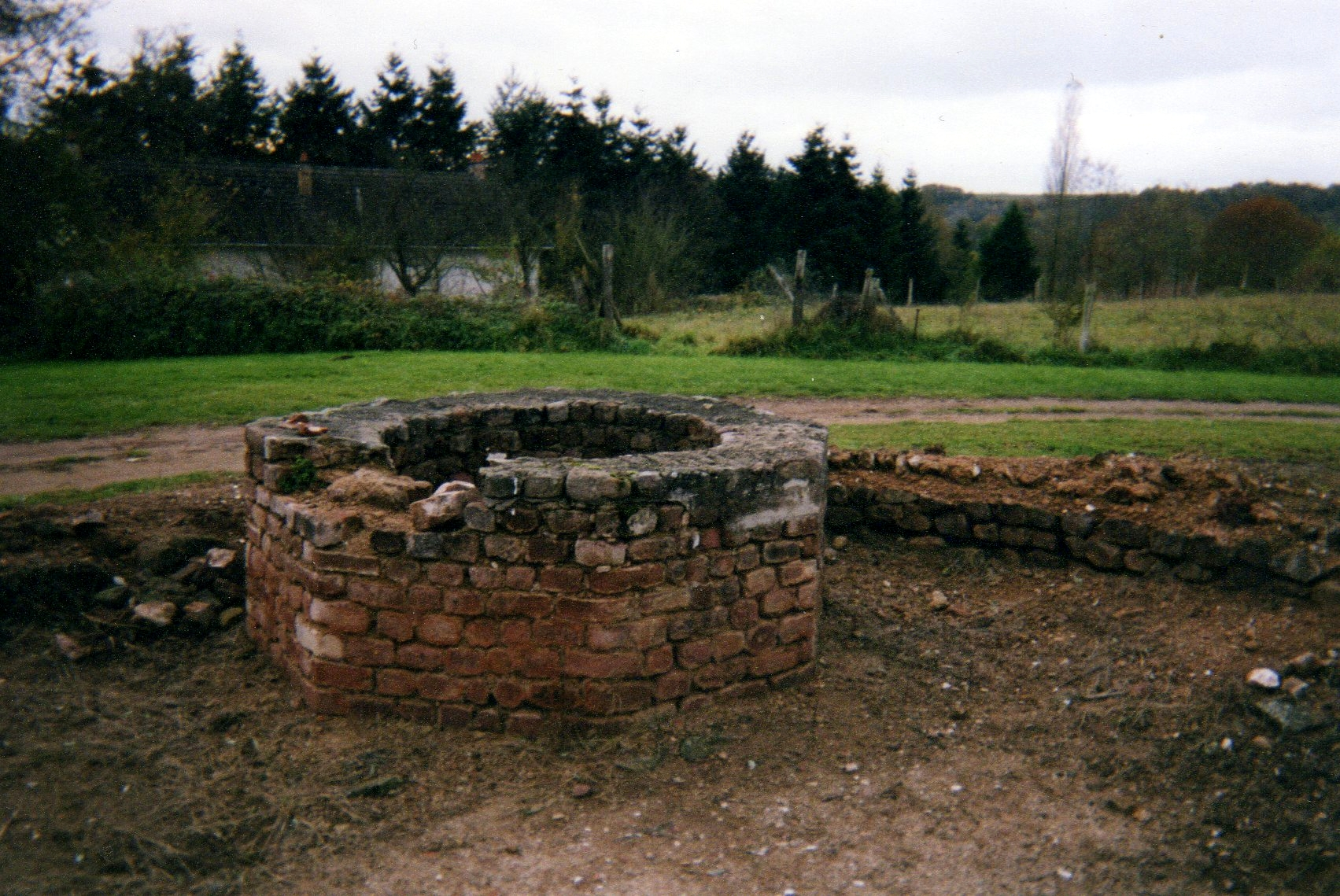 Enceinte sacrée (faussement appelée puits) dans le sanctuaire